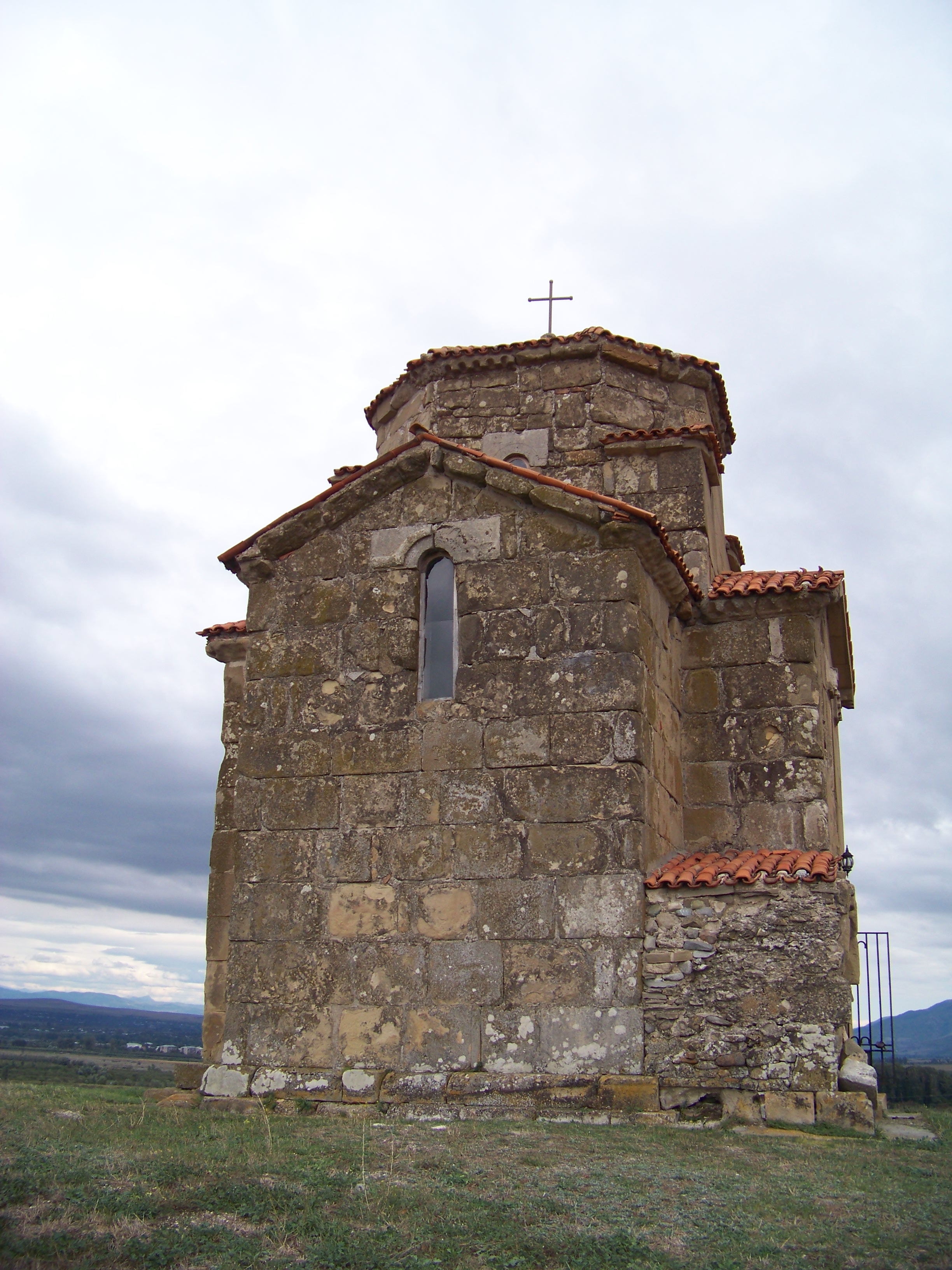 სამწევრისის ტაძარი და კარიბჭე